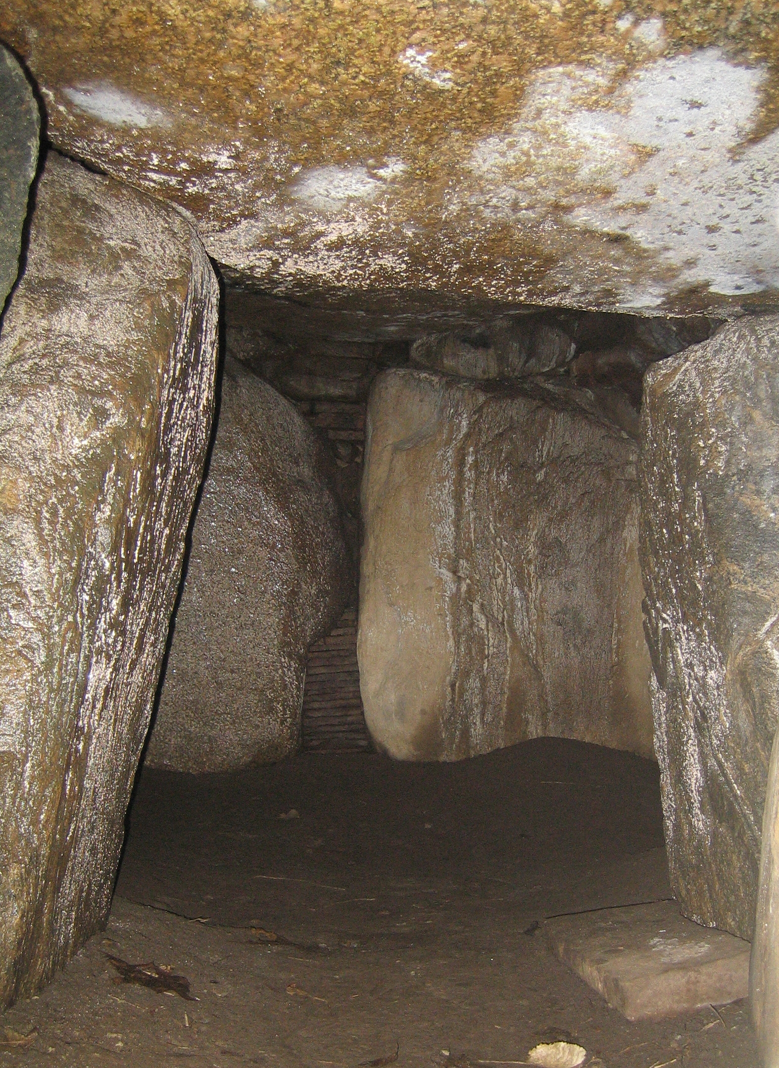 Inside Gillhög megalith grave in Skåne, Sweden